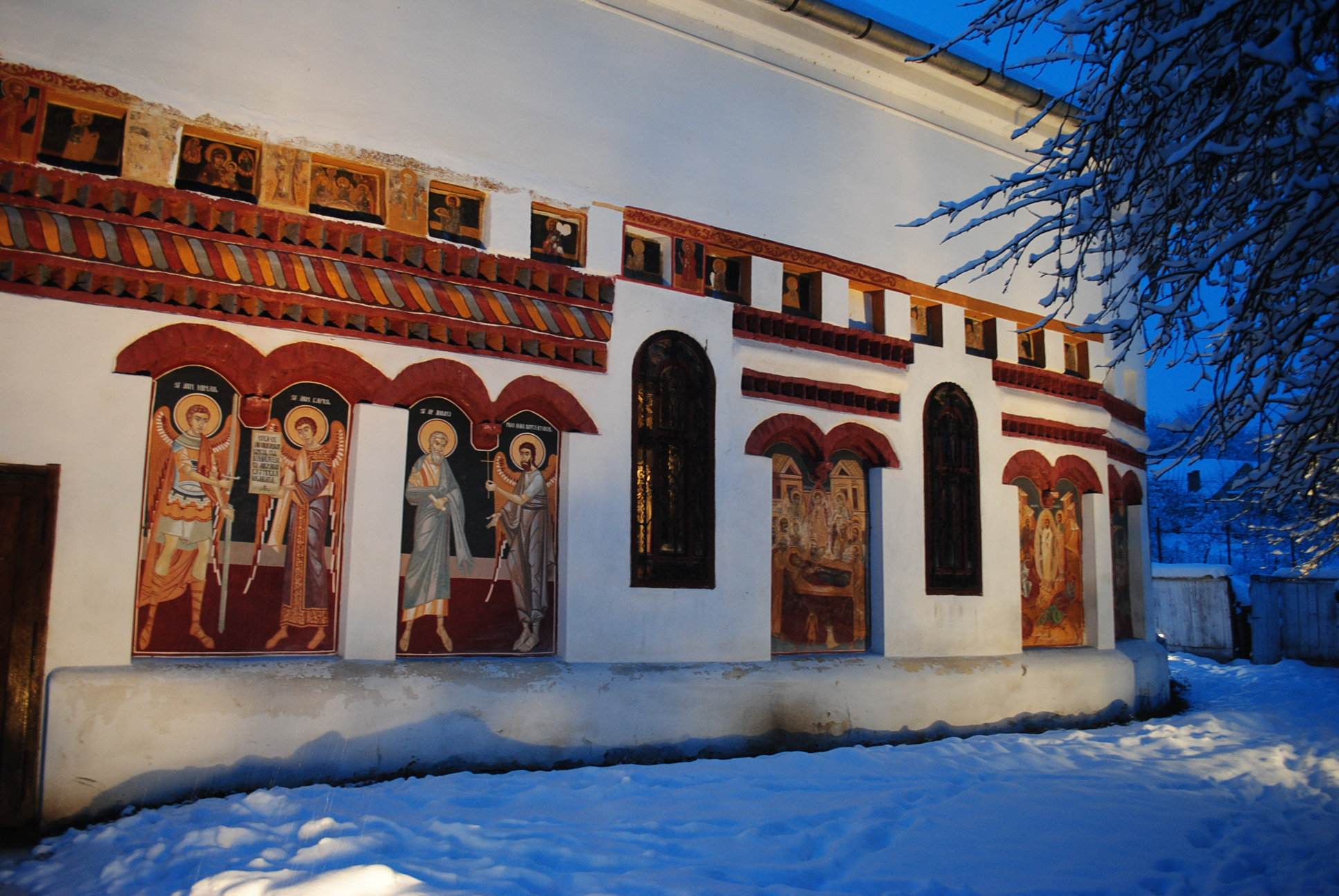 Biserica "Sf. Arhanghelii Mihail și Gavriil", cca. 1700